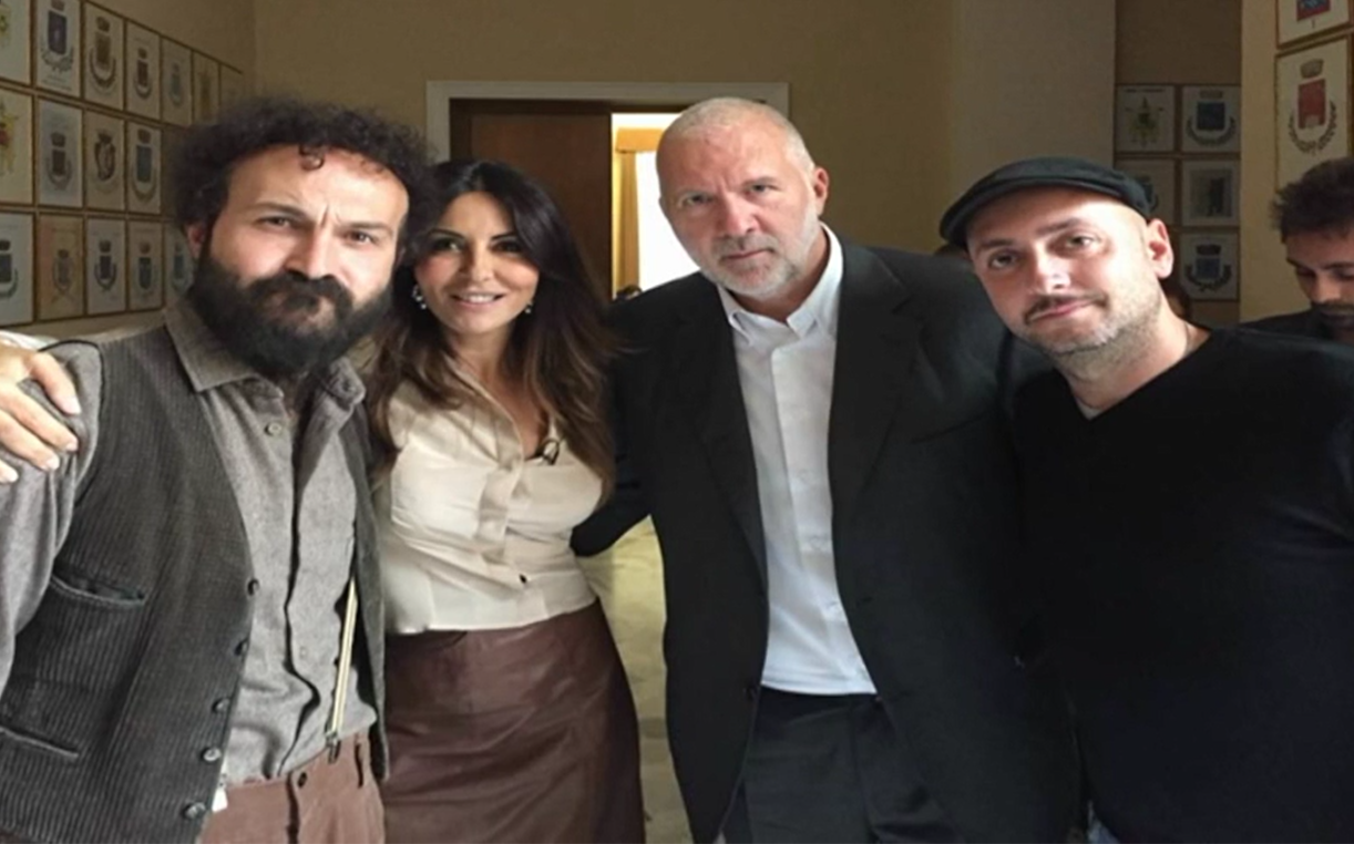 Marcello Macchia, in arte Maccio Capatonda, Sabrina Ferilli, Massimo Picozzi ed Enrico Venti, in arte Ivo Avido, riuniti a Chieti per le riprese del film Omicidio all'italiana